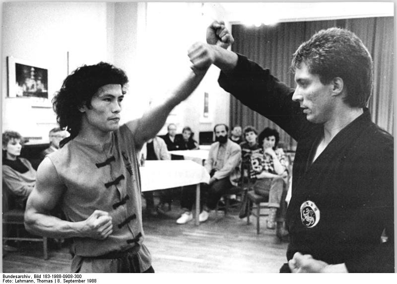 Halle/Saale, Darbietung von asiatischem Kampfsport Zum Beitrag: Budokai mit einem Hauch Erotik - Rasante asiatische Zweikampfkunst eines Duos. ADN-ZB Lehmann-8.9.1988-ha. Das Duo Budokai demonstriert in Halle asiatische Zweikampfkunst in Perfektion. Da die blitzschneller Aktionen und Techniken vom Zuschauer kaum genau zu verfolgen sind, führen die beiden Kämpfer Bernd Kothe, Computerspezialist aus Halle, und Chu-Tan-Cuong aus Hanoi, der in der DDR ein Jura-Studium absolvierte, gewissermaßen in Zeitlupf ihre Aktionen vor. Technische Perfektion verlangt dieser Aga-Uke, eine Blocktechnik. (Hierzu gehören 1988-0908-300 + 301 N)